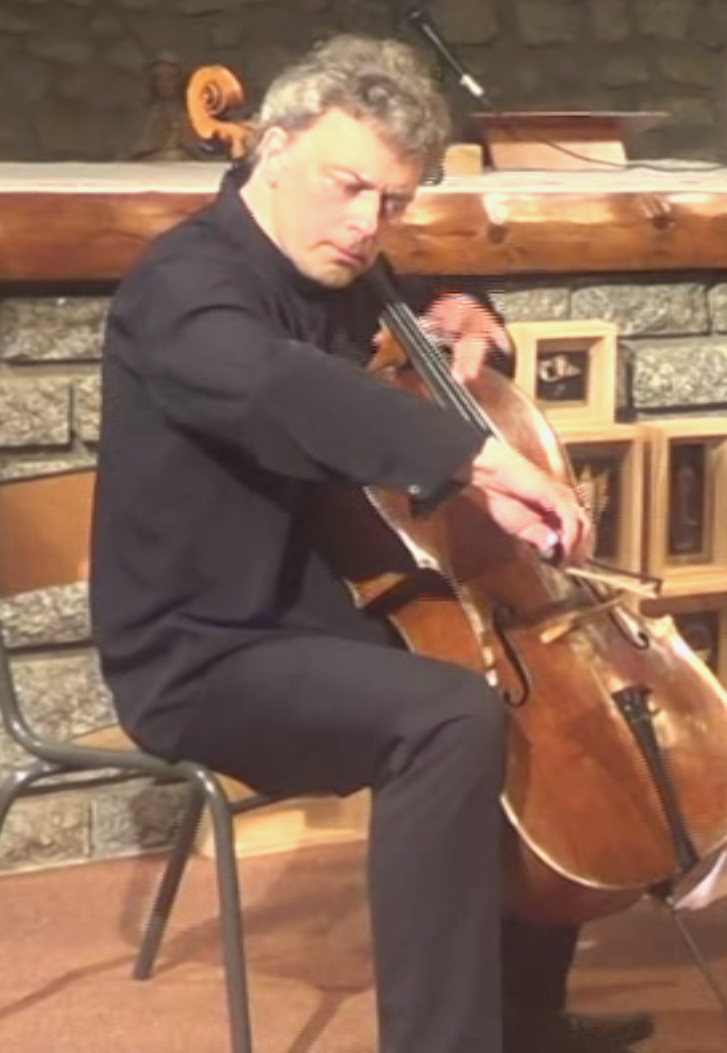 Raphaêl Pidoux lors du concert donné à Volore-Montagne le 17 juillet 2014 avec Elodie Soulard, accordéoniste